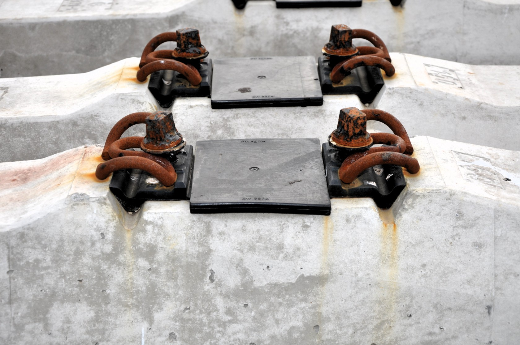 Seitliche Ansicht Oberbau W ohne Schiene.